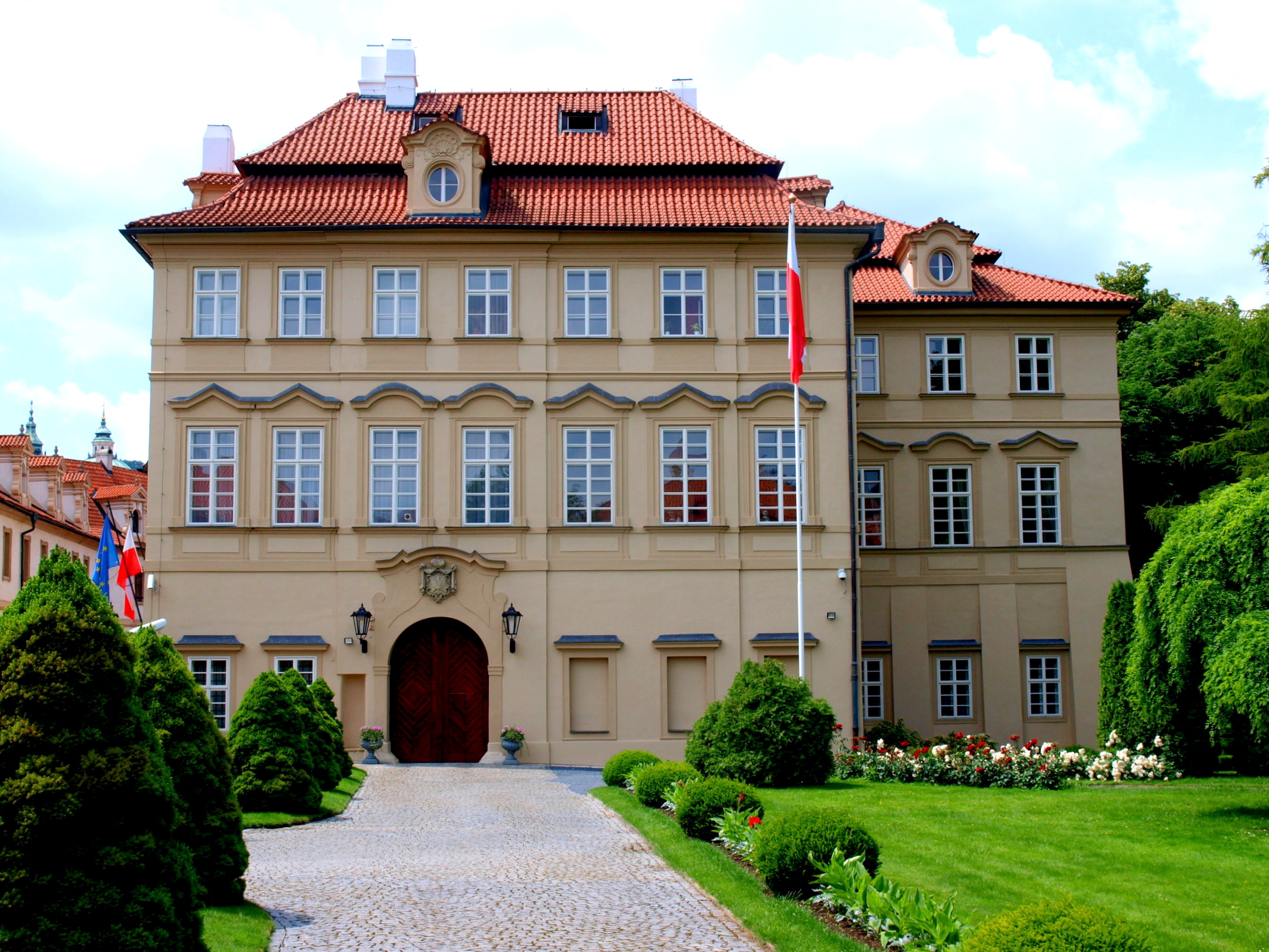 Malý Fürstenberský palác